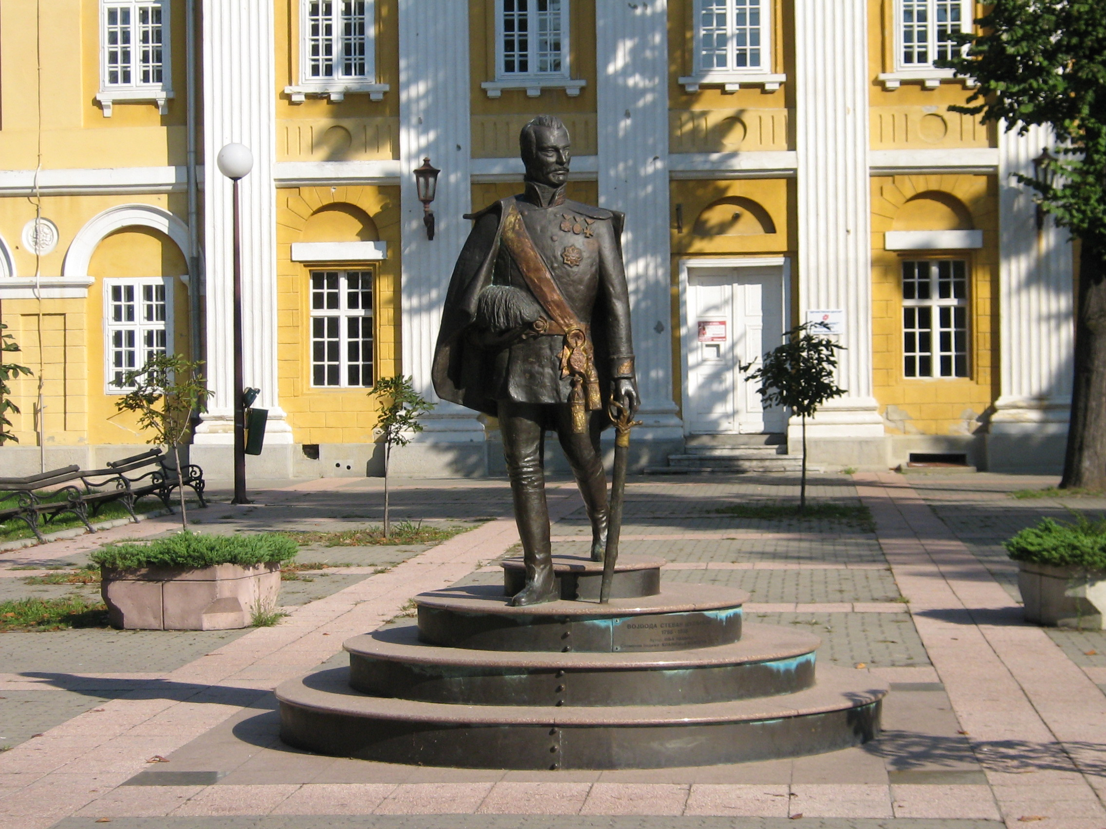 Statue of duke Stevan Šupljikac (1786-1848) in Pančevo; work by Olja Ivanjicki/Statua vojvode Stevana Šupljikca u Pančevu; rad Olje Ivanjicki